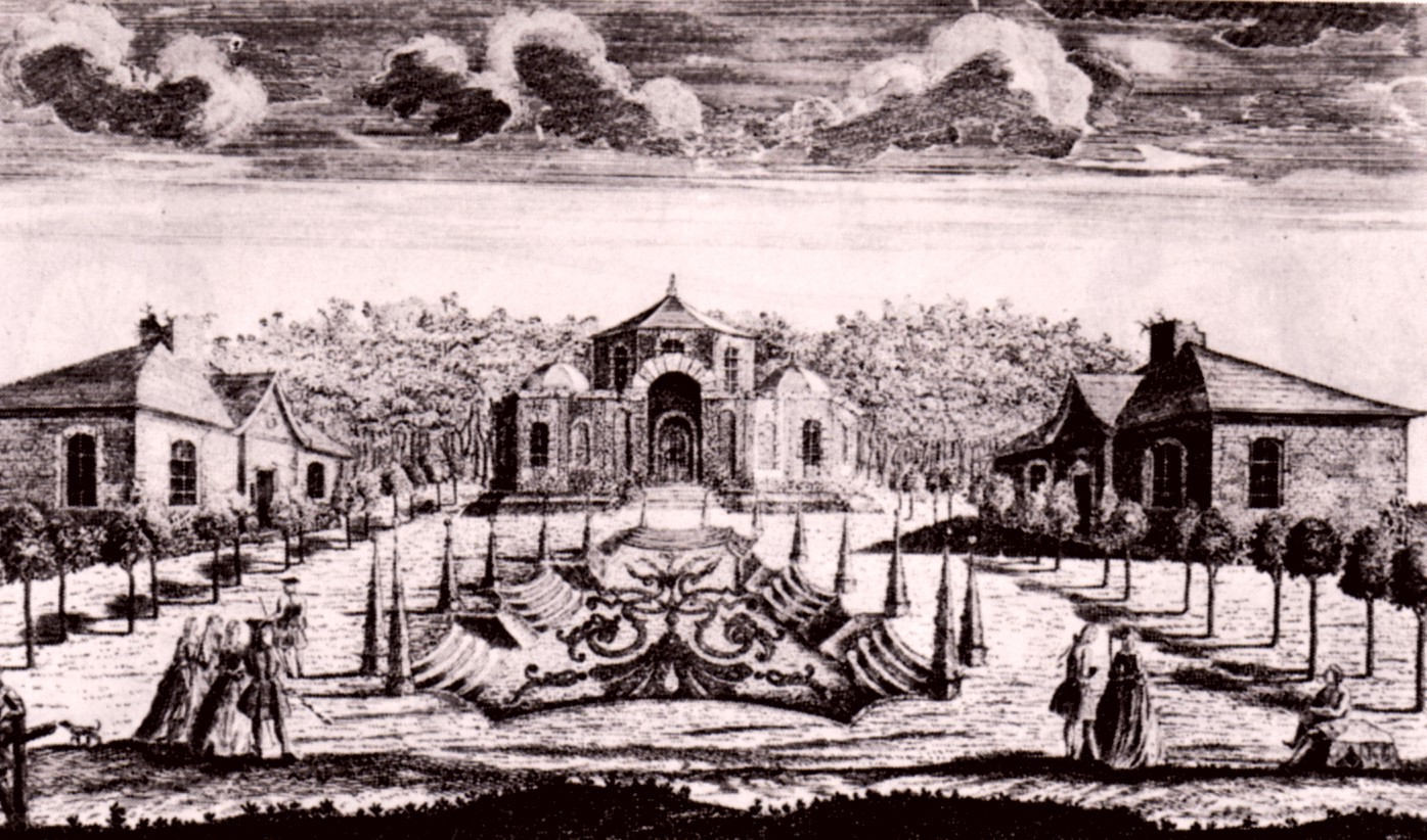 Felsengarten Sanspareil (Franken, Bayern), Parterre mit Morgenländischem Bau, Burggrafen- und Markgrafenhaus 1748